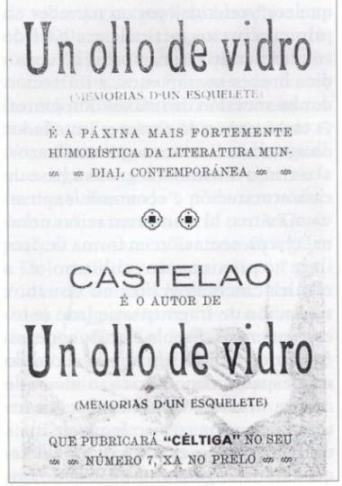 Un ollo de vidro, memorias d·un esquelete, é a páxina mais fortemente humorística da literatura mundial contemporánea. Castelao é o autor de Un ollo de vidro (memorias d·un esquelete) que pubricará "Céltiga" no seu número 7, xa no prelo.